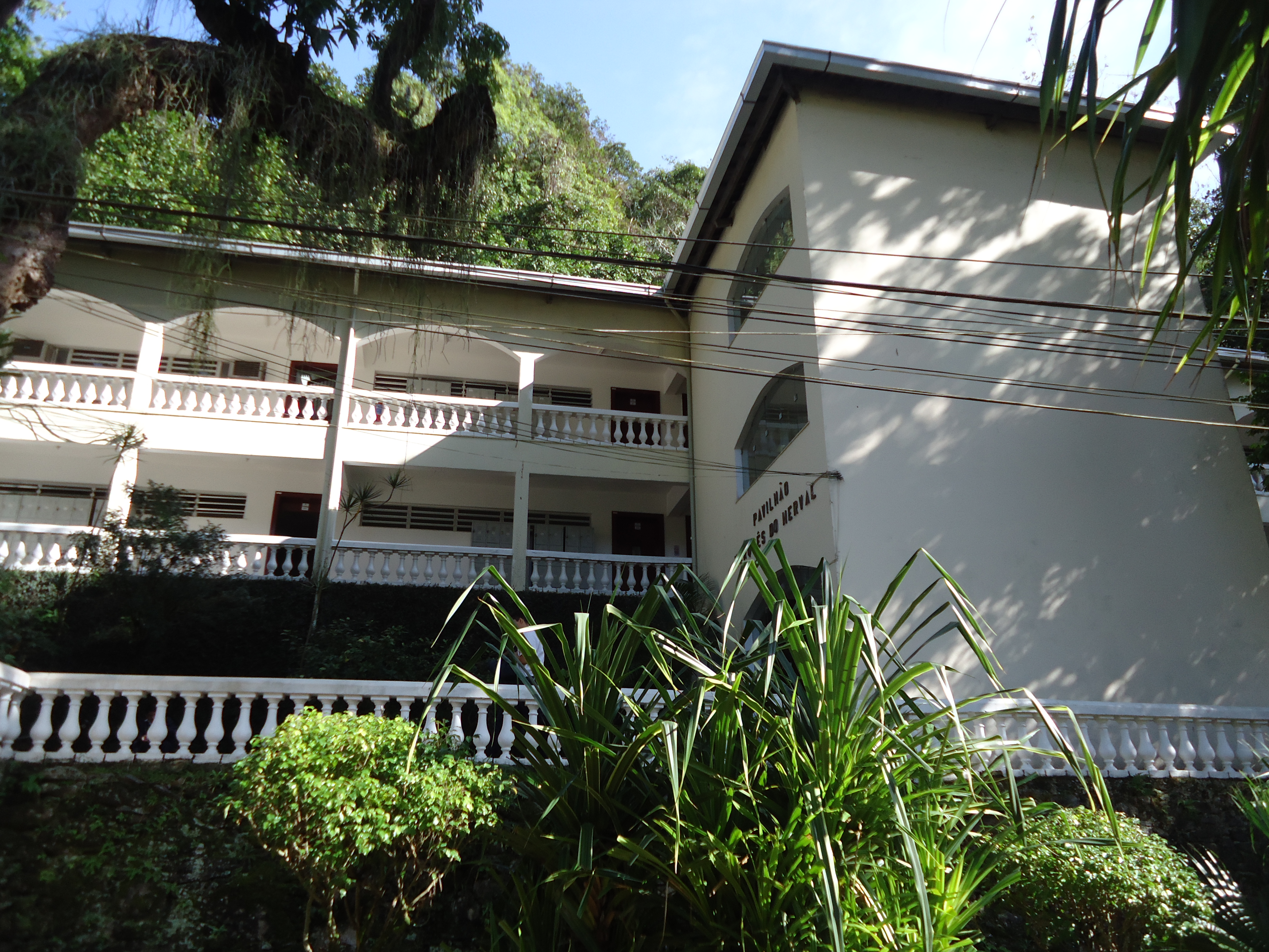 Fundação Osório, Rio Comprido, Rio de Janeiro, RJ, Brasil: Pavilhão Marquês do Herval (ensino médio).